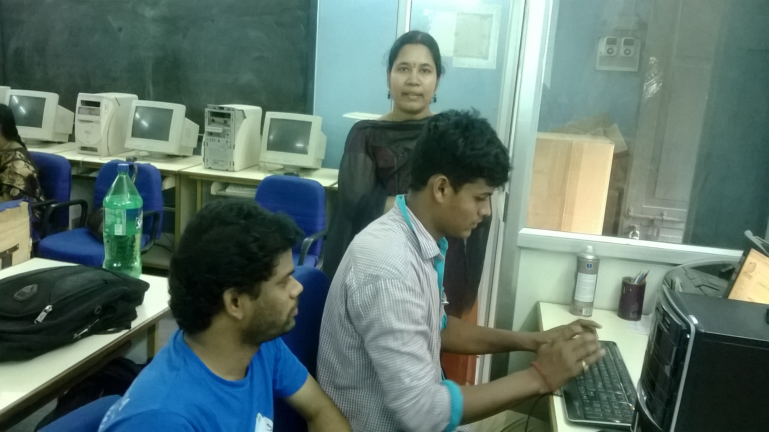 వికీపీడియా:శిక్షణ-శిబిరం/హైదరాబాద్/హైదరాబాద్ 7